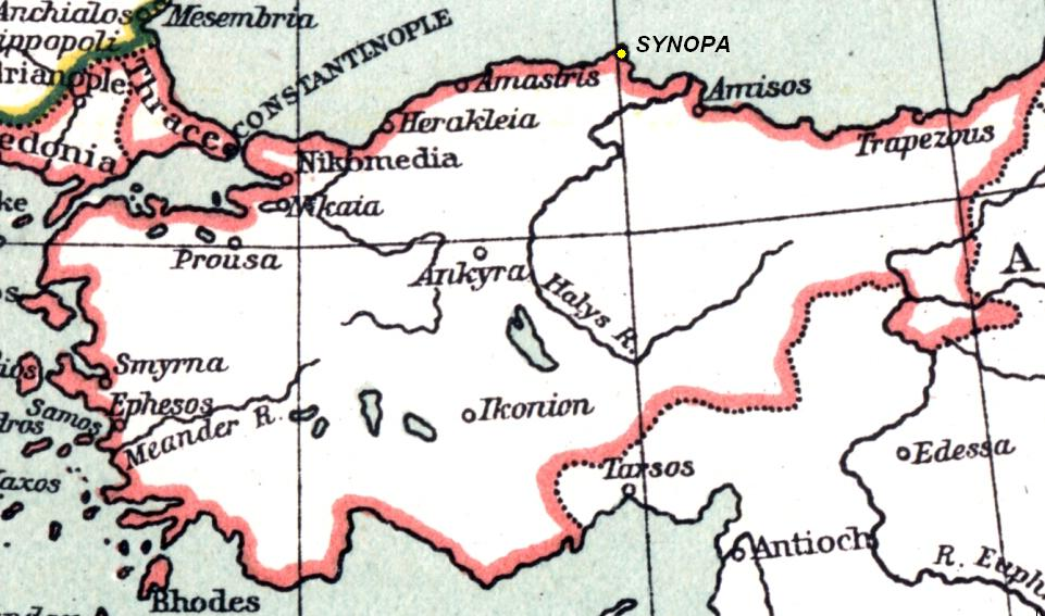 Synopa w granicach Cesarstwa bizantyjskiego około 910 r.